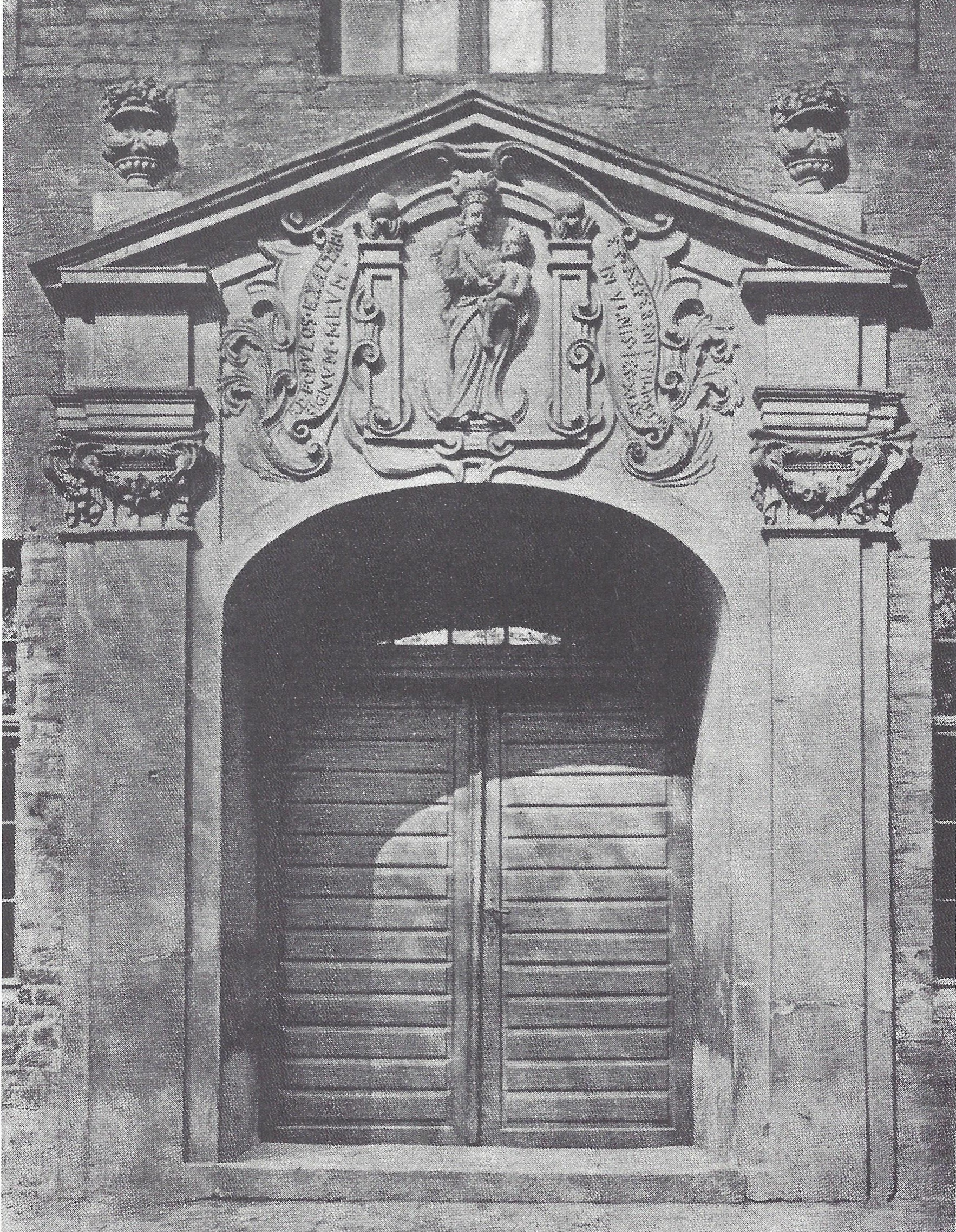 Universität Frankfurt a. O.: Eingang zum Kollegienbereichs.